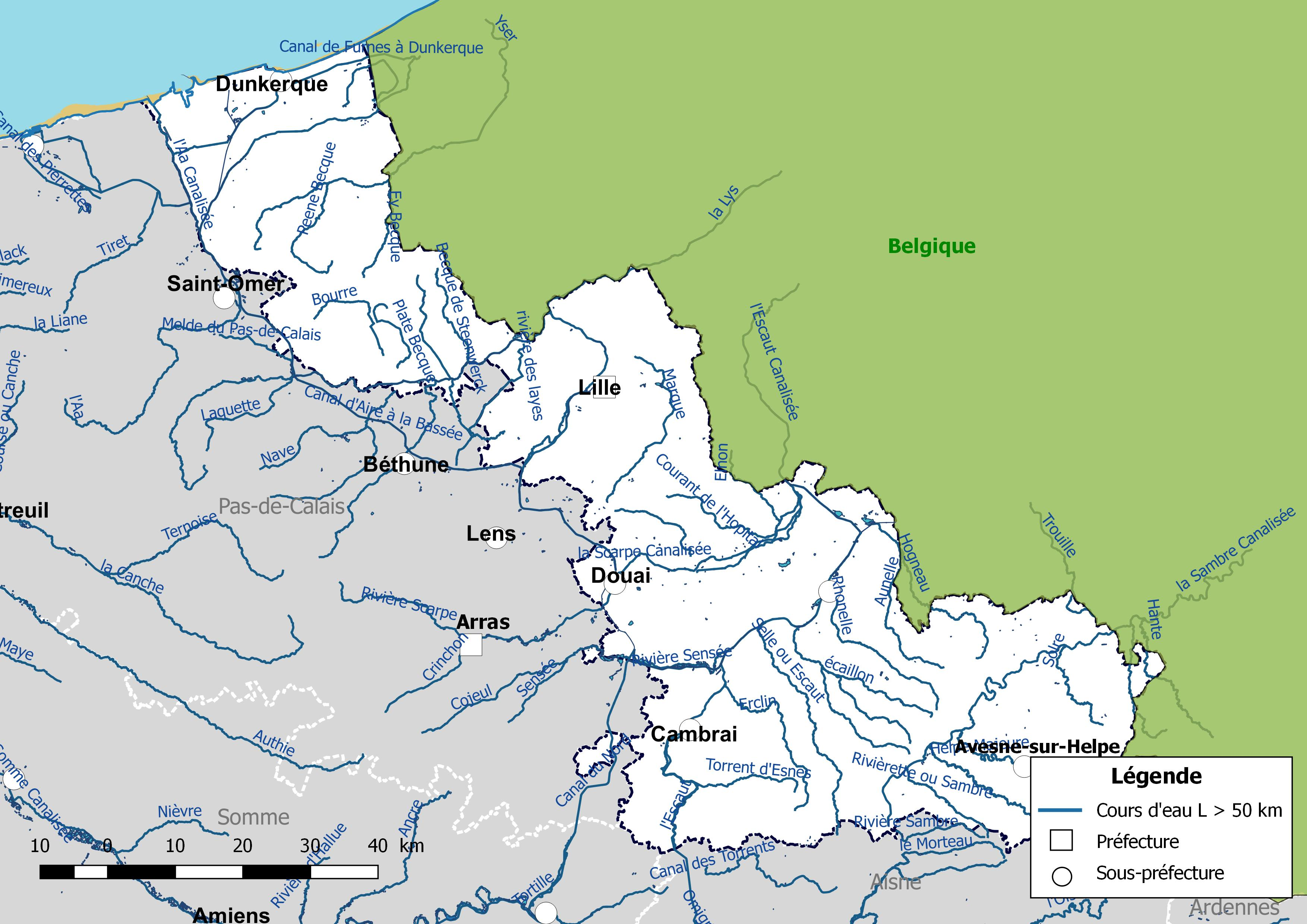 Carte des cours d'eau de longueur supérieure à 50 km drainant le département du Nord (France).